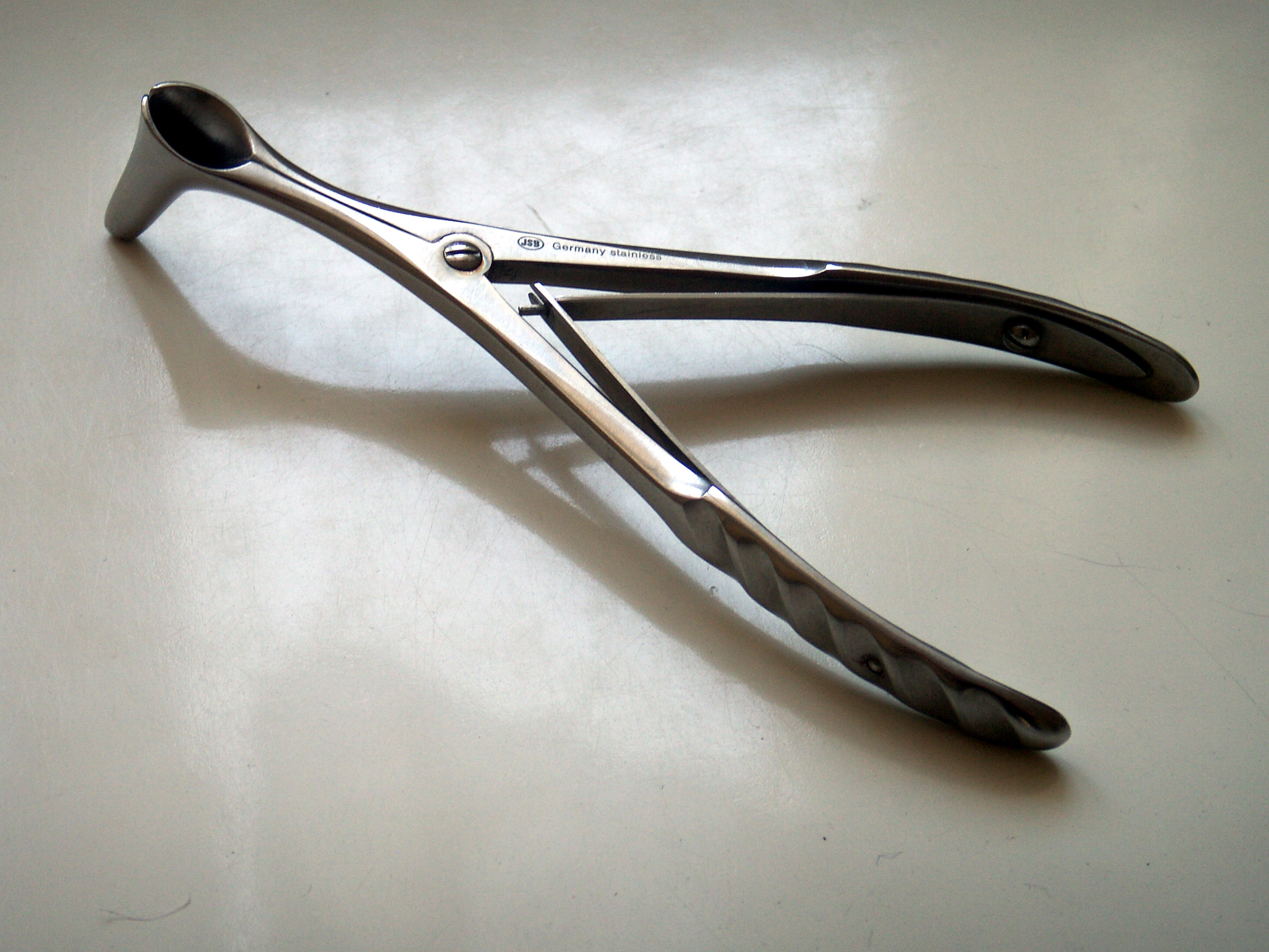 Nasenspekulum der HNO-Heilkunde